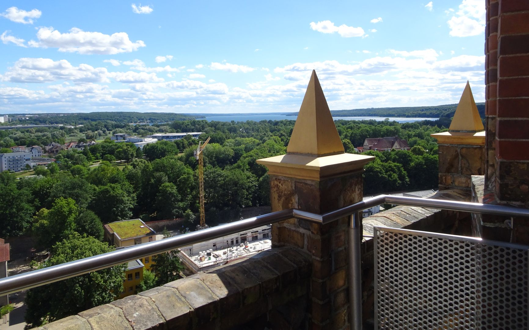 Blick vom Turm der Konzertkirche Neubrandenburg in Richtung Tollensesee